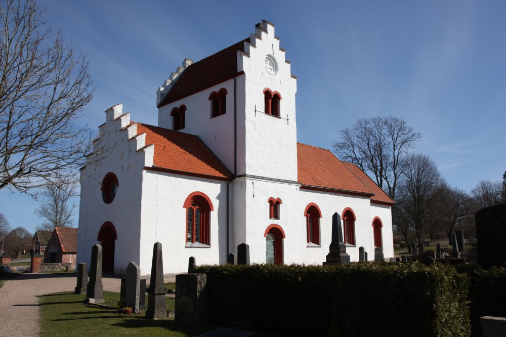 Hästveda kyrka 20120404-095